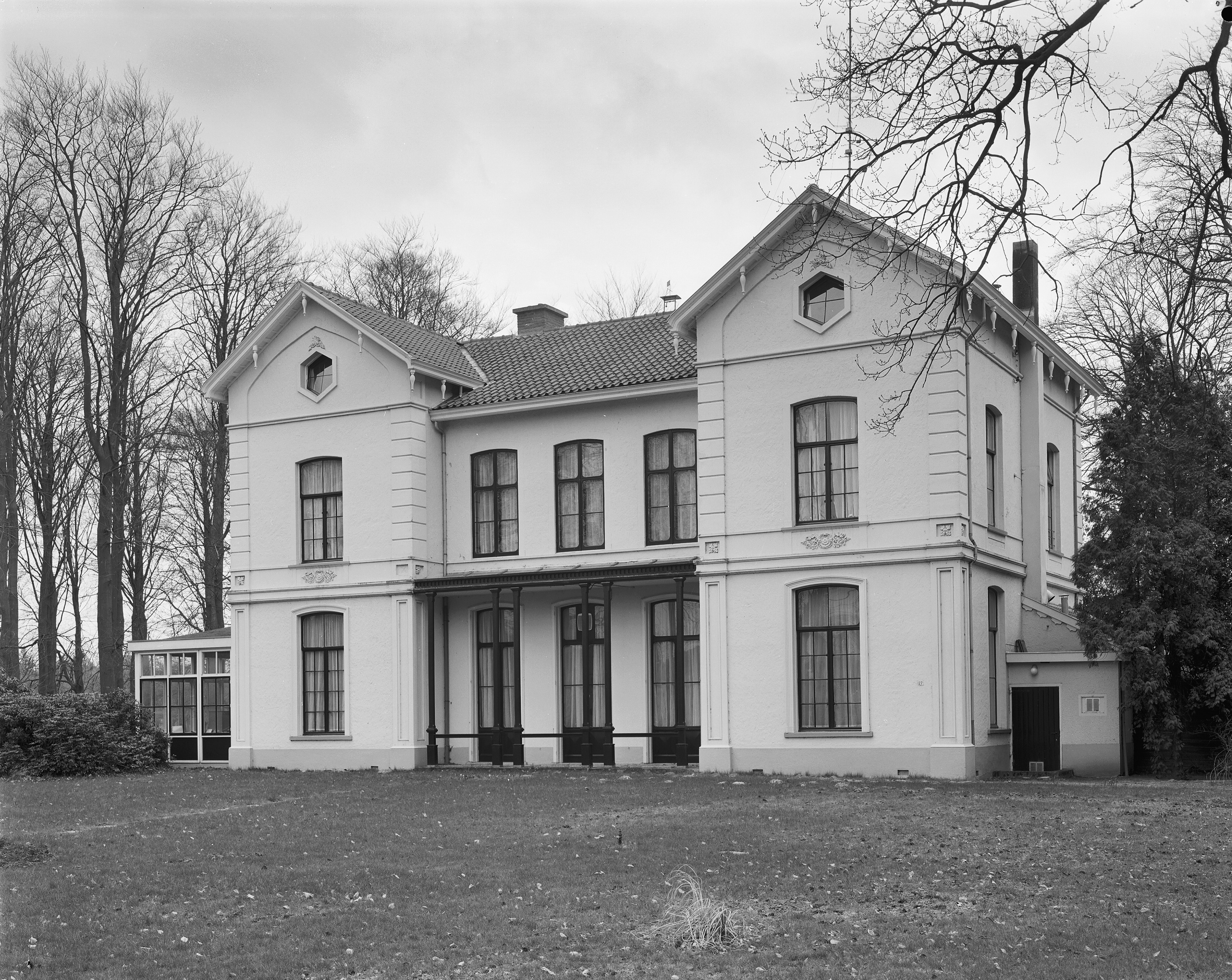 Buitenhuizen: "Doornveld", Driebergsestraat 27 voorgevel. The mayor of Doorn, Alphert Schimmelpenninck van der Oye, lived here with his family from 1910-1929